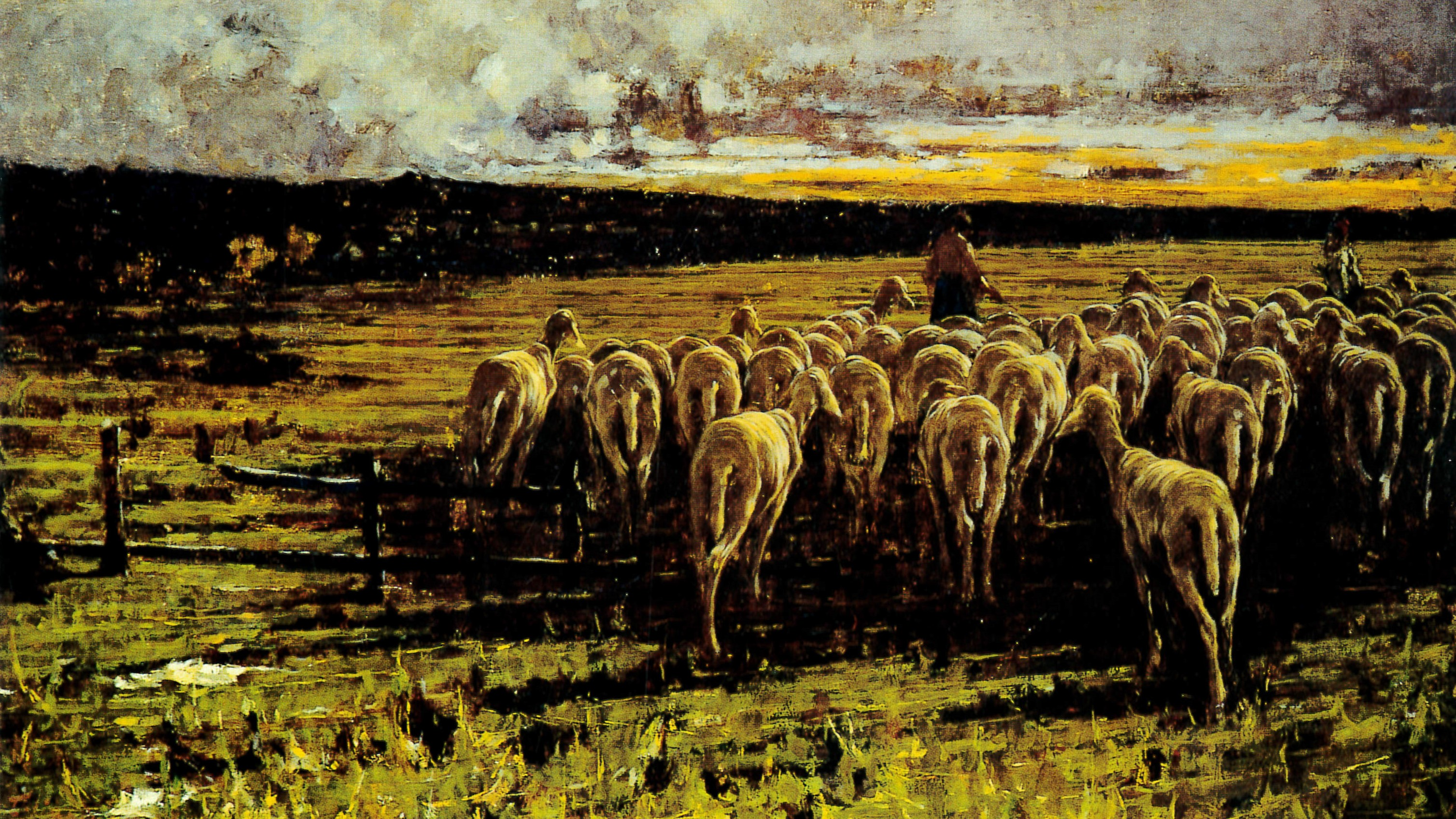 Francesco Filippini, Ritorno al Pascolo